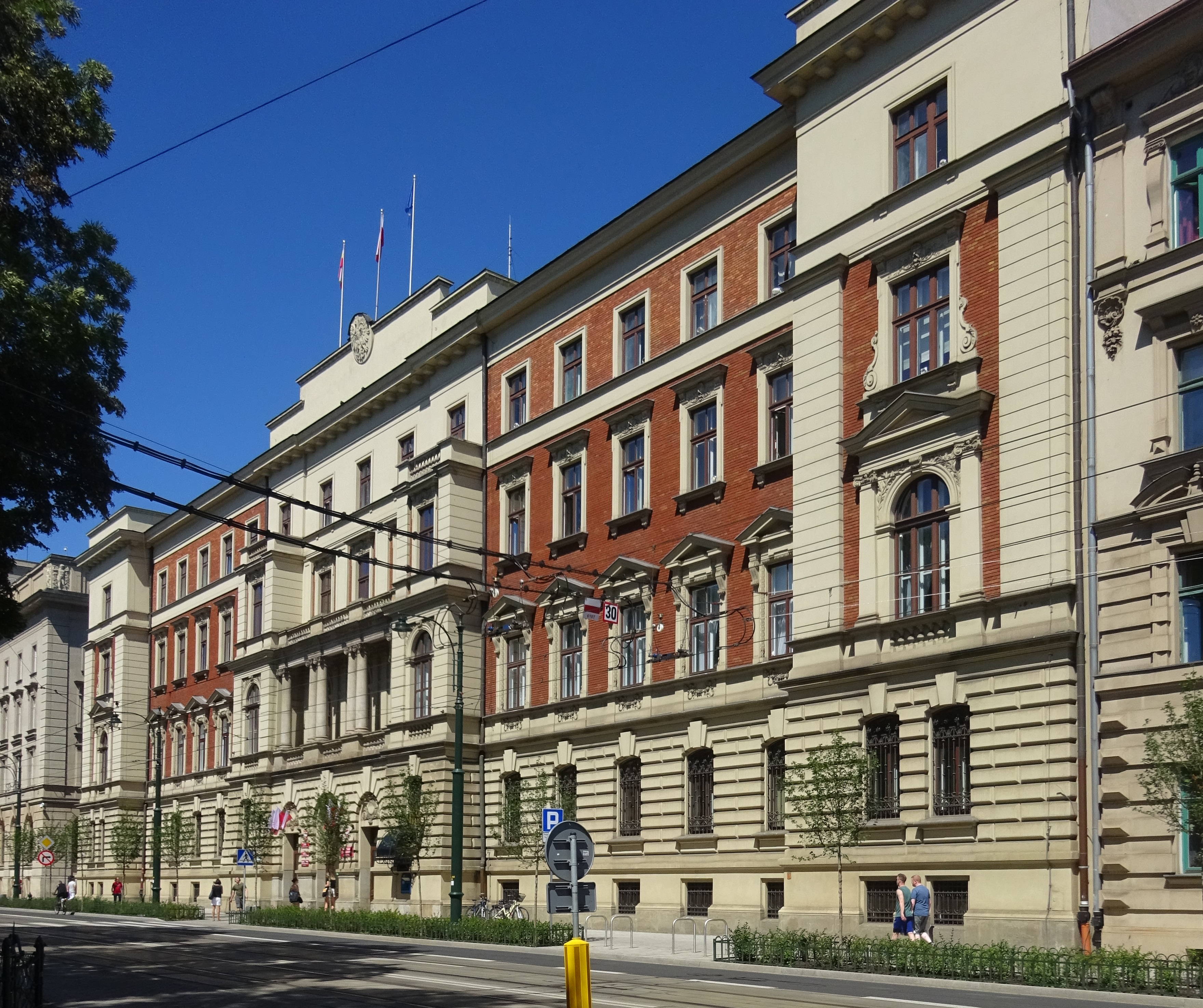 Gmach Małopolskiego Urzędu Wojewódzkiego w Krakowie przy ulicy Basztowej 22. Projekt architekta Alfreda Broniewskiego (1900).